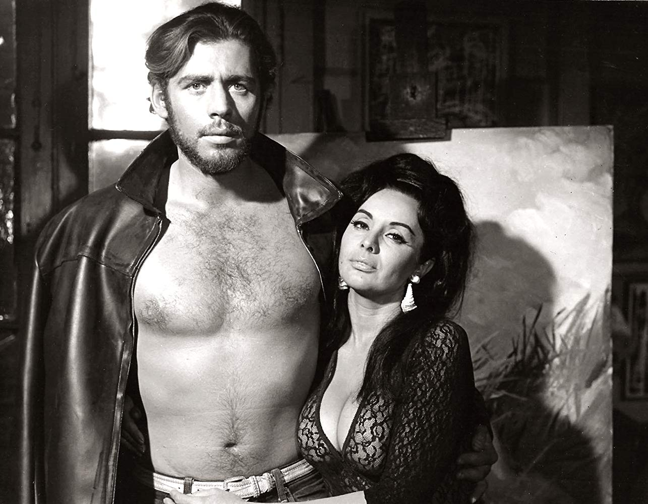 Víctor Bó e Isabel Sarli en Carne, película de 1968.